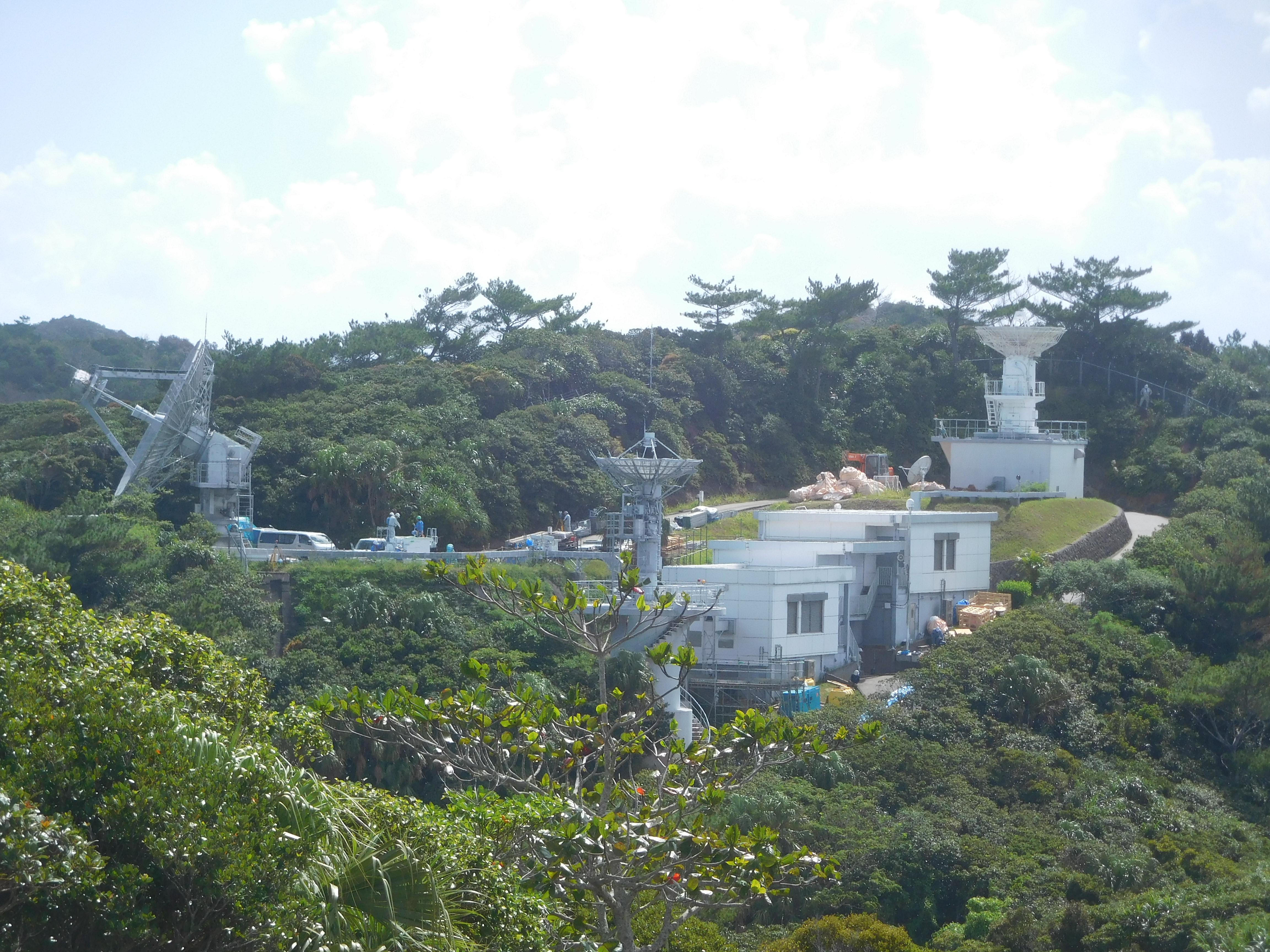 小笠原追跡所 20160920撮影